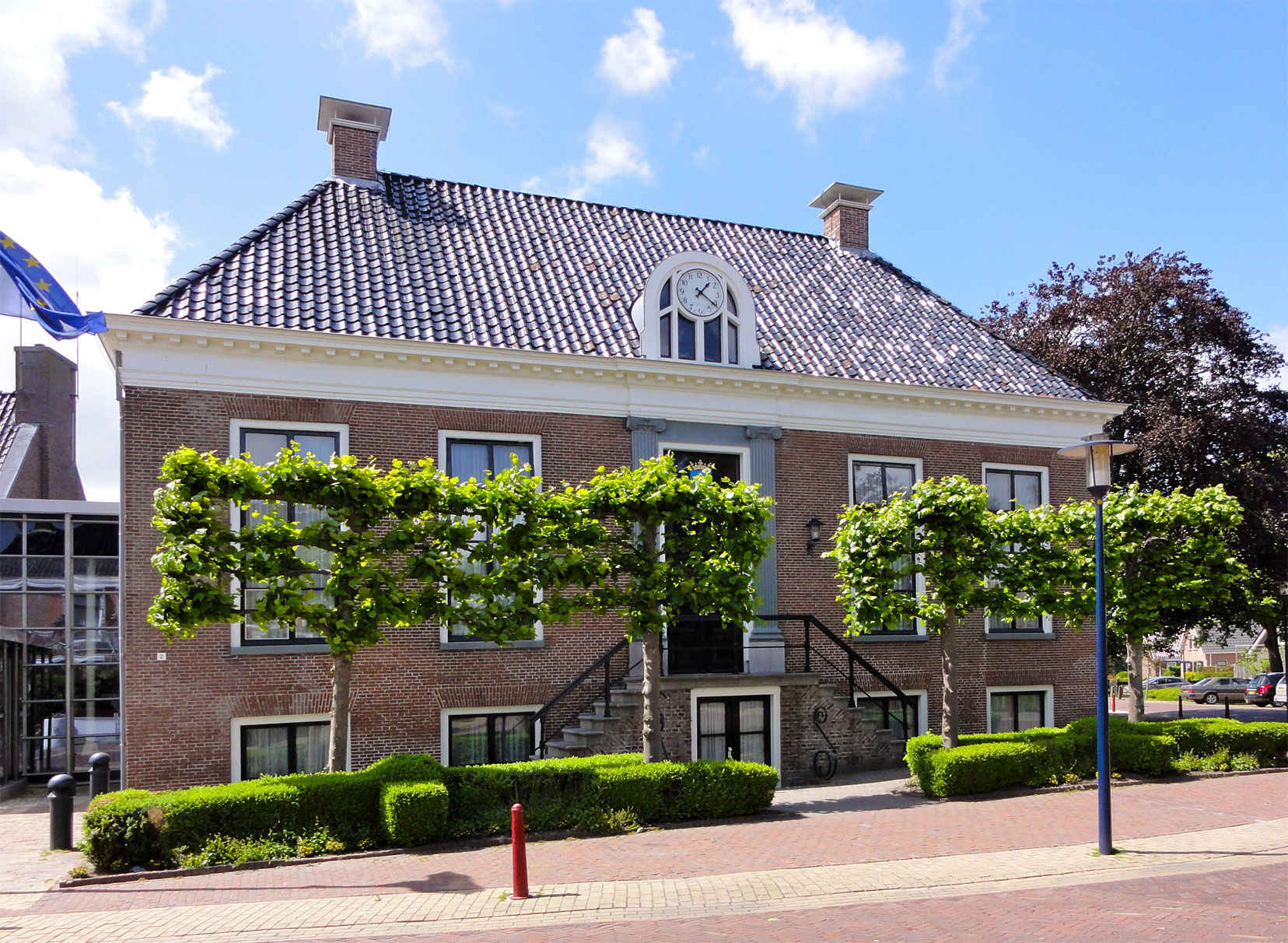 Hogebeintummerdijk 2 (raadhuis) in Ferwerd